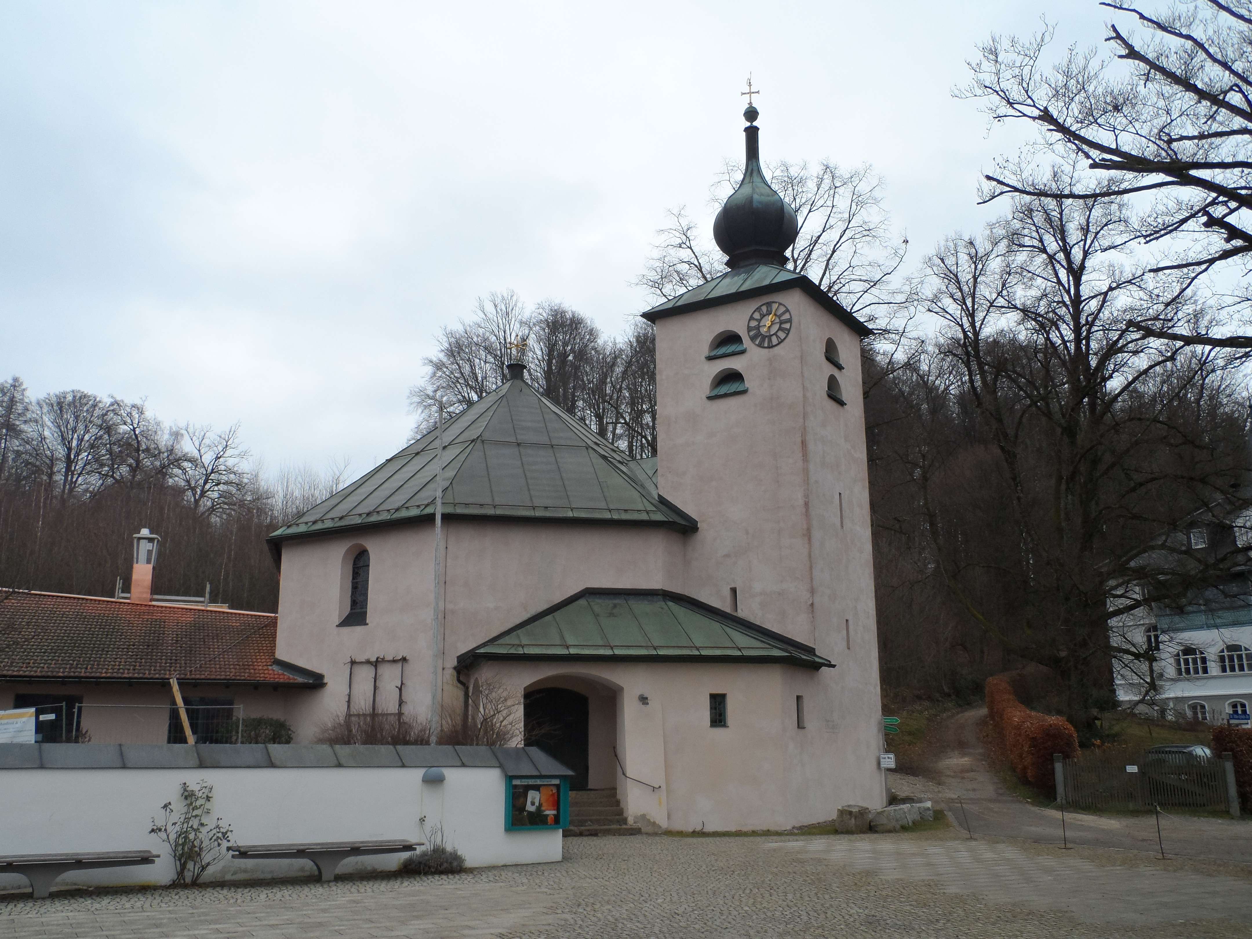 Evangelisch-lutherische Pfarrkirche - Prien am Chiemsee